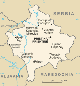 Kosovo kaart